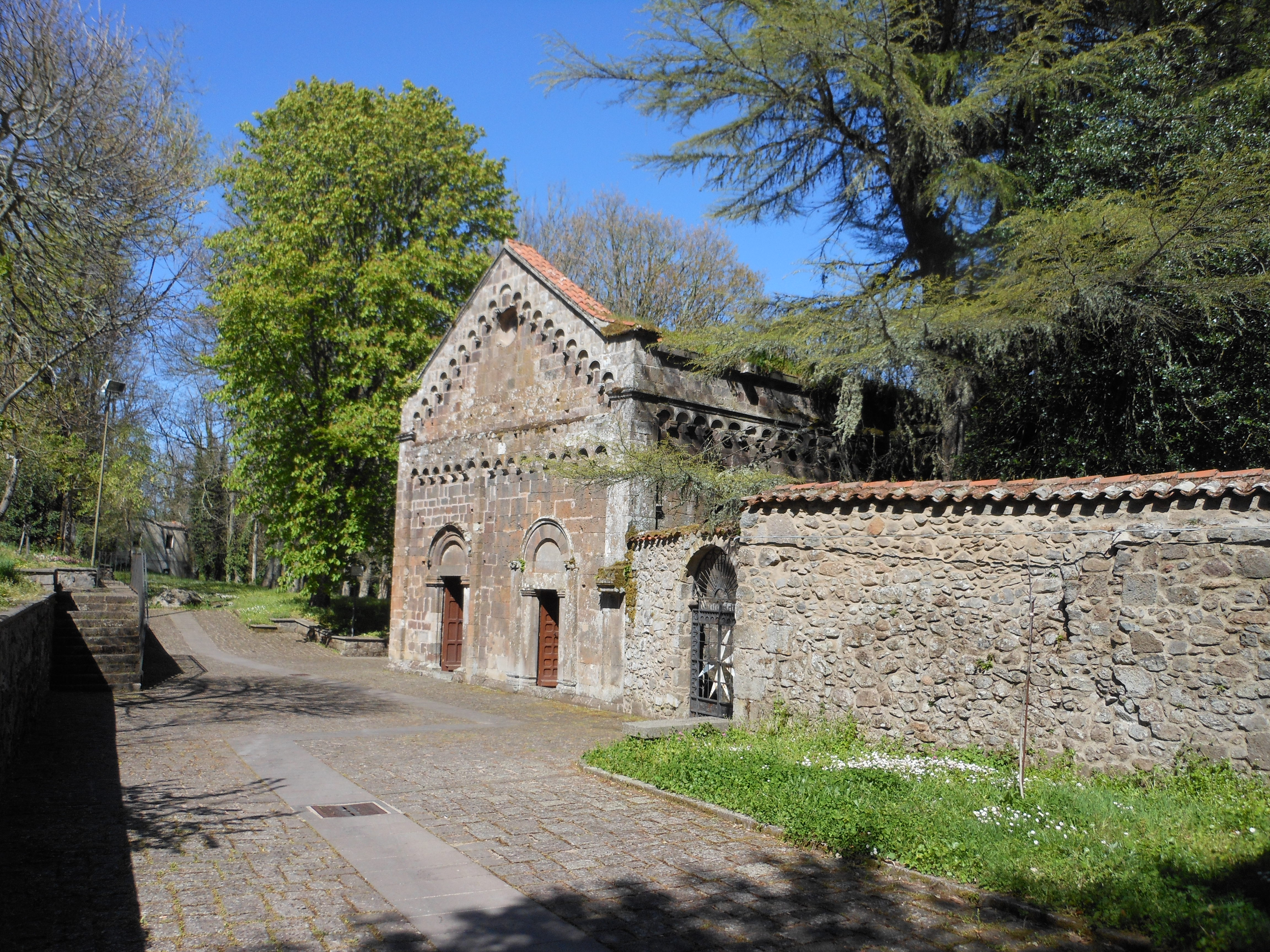 Santu Lussurgiu - San Leonardo di Siete Fuentes, Sardegna